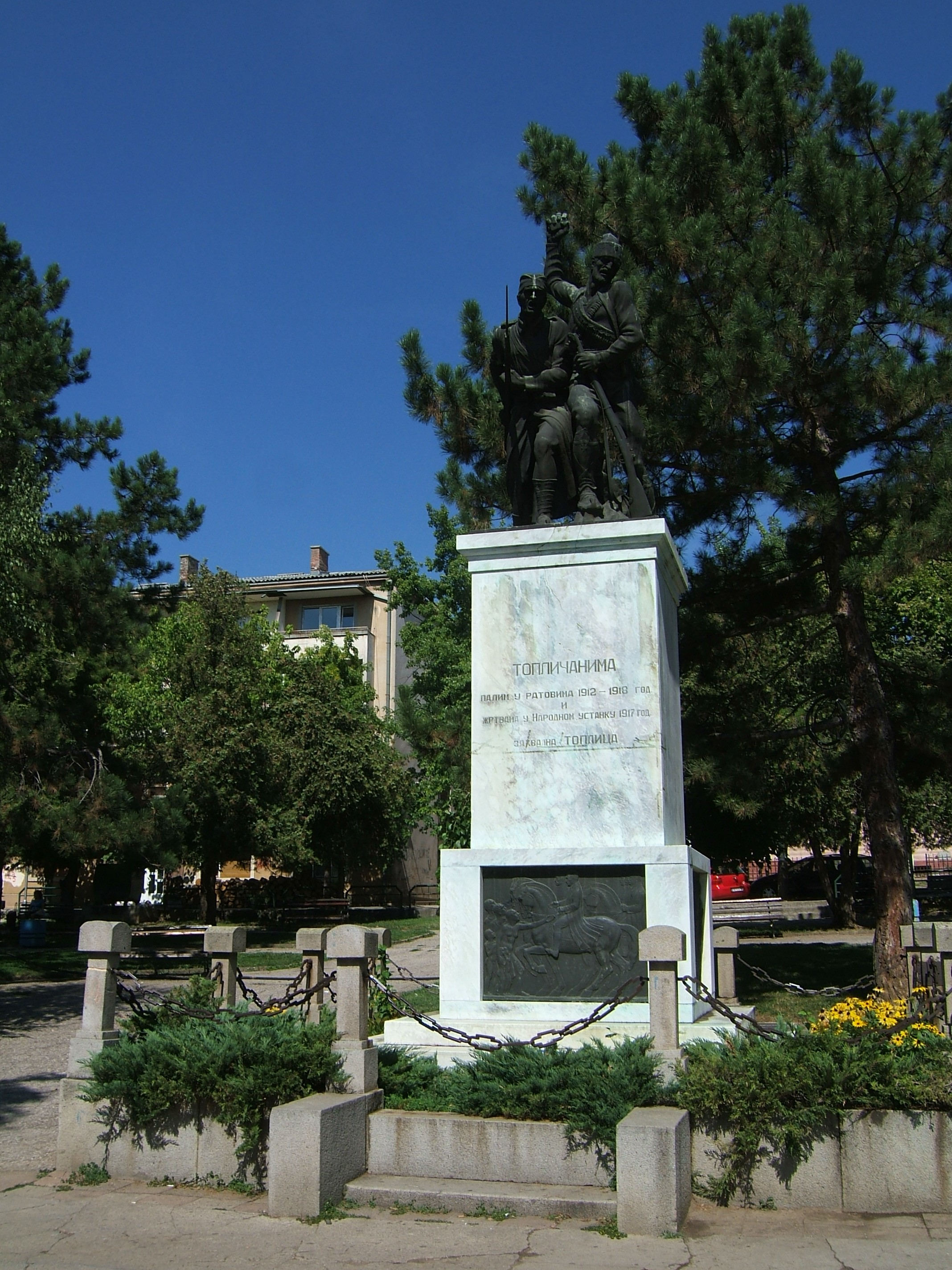 Споменик палим Топличанима у ратовима 1912-1918. године у Прокупљу